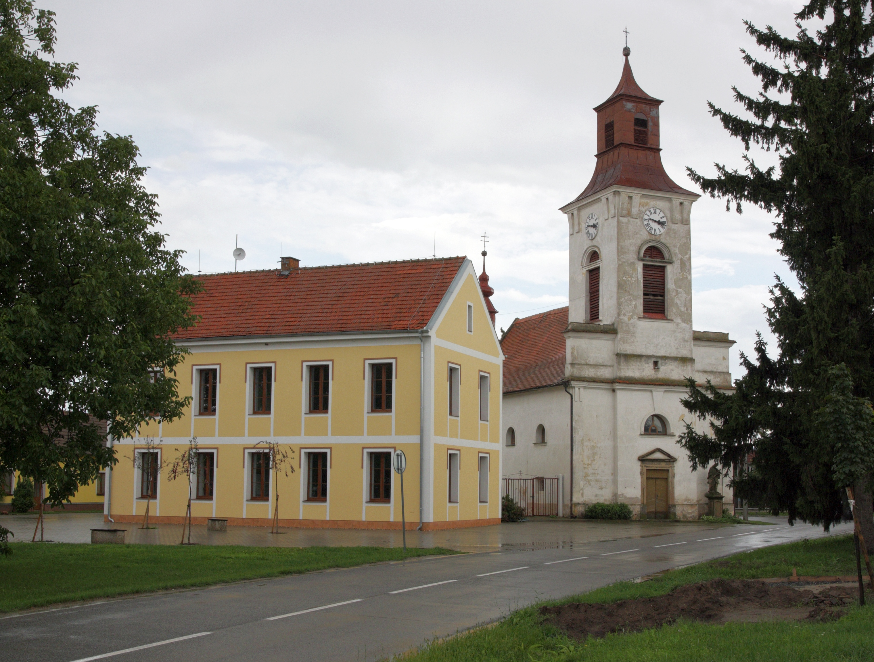 Cvrčovice (okres Brno-venkov) - centrum obce s kostelem.